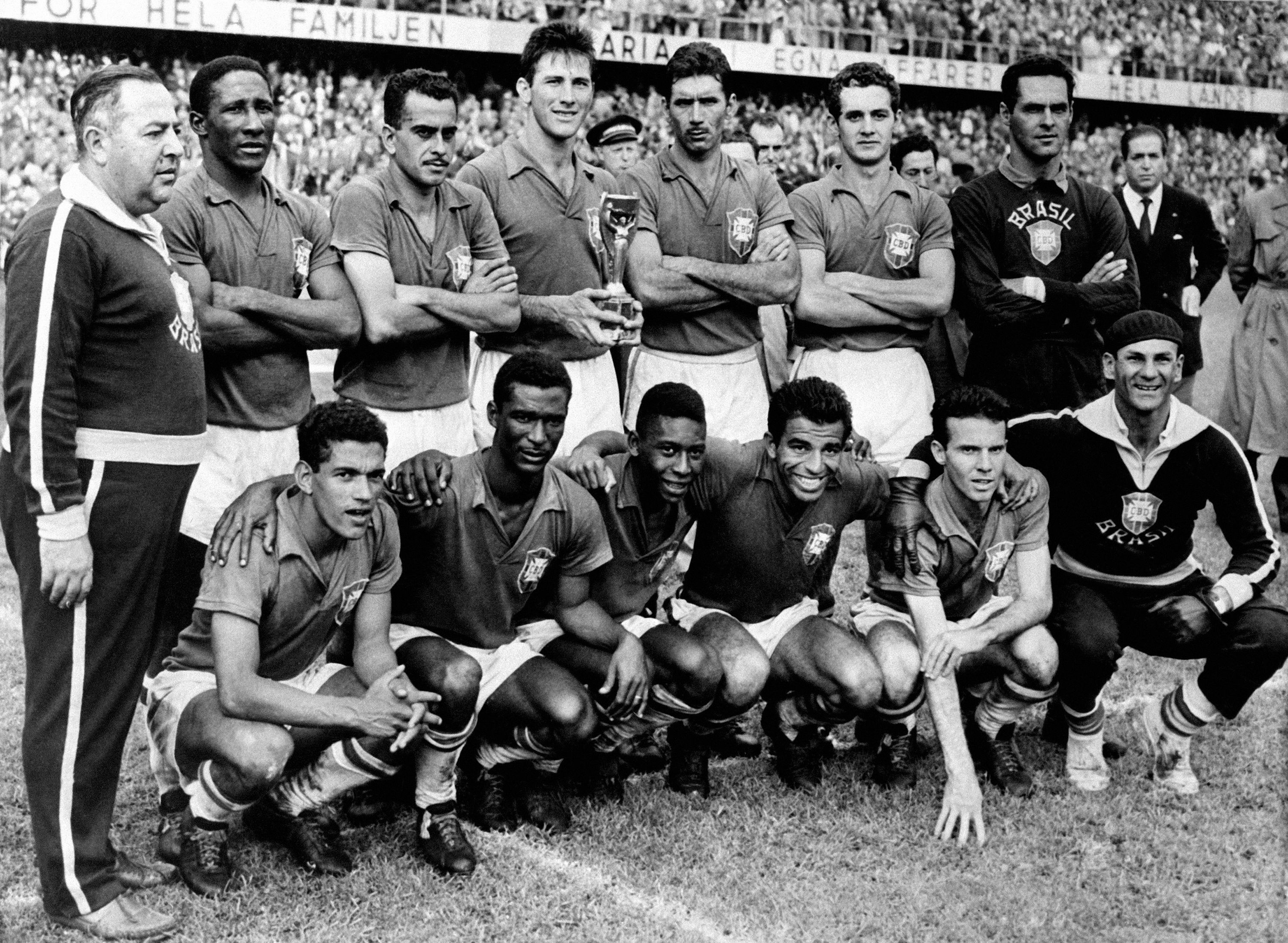 Brazil - World Cup Winner 1958 Vicente Feola (coach), Djalma Santos, Zito, Bellini, Nilton Santos, Orlando, Gylmar -Garrincha, Didi, Pelé, Vava, Zagallo.